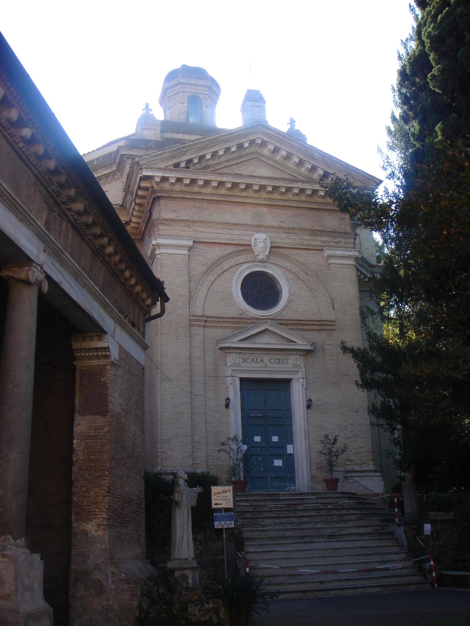 Roma, Abbazia delle Tre Fontane: Santa maria in Scala Coeli